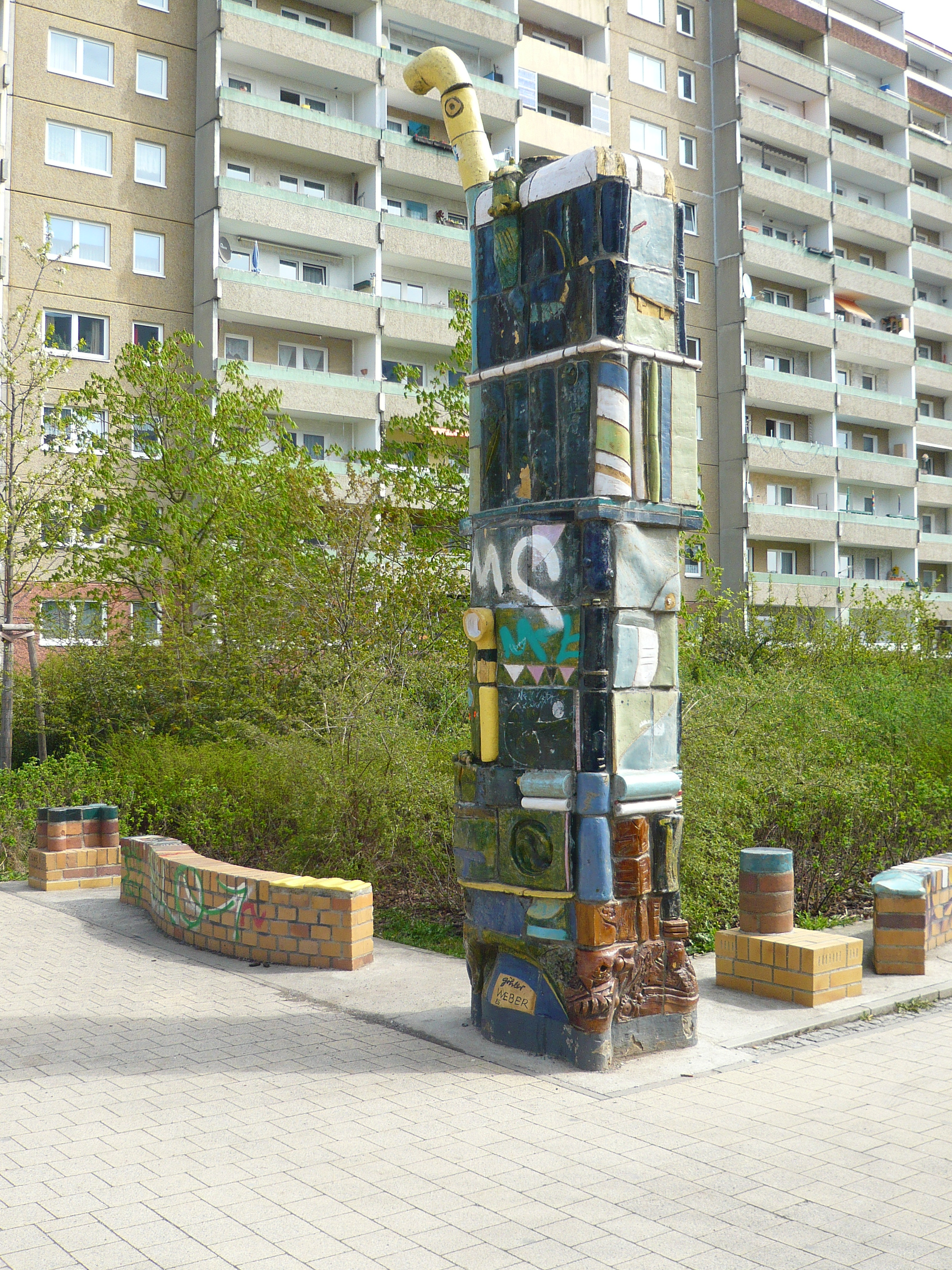 Ortsteil Berlin-Marzahn: Clara-Zetkin-Park